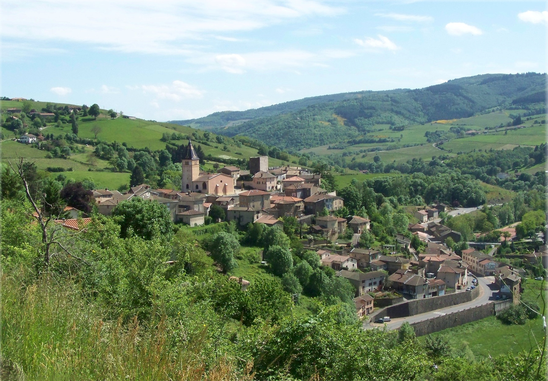 Le Village de Chamelet (Rhône, France).